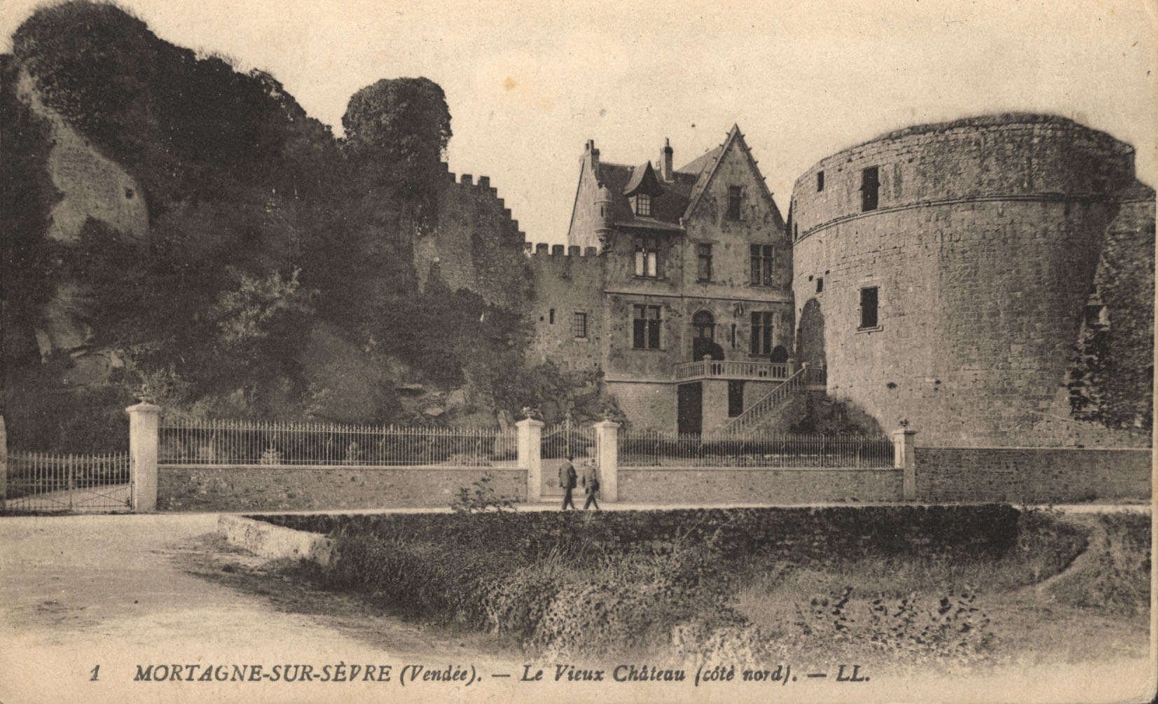 Le manoir et la tour des anglais